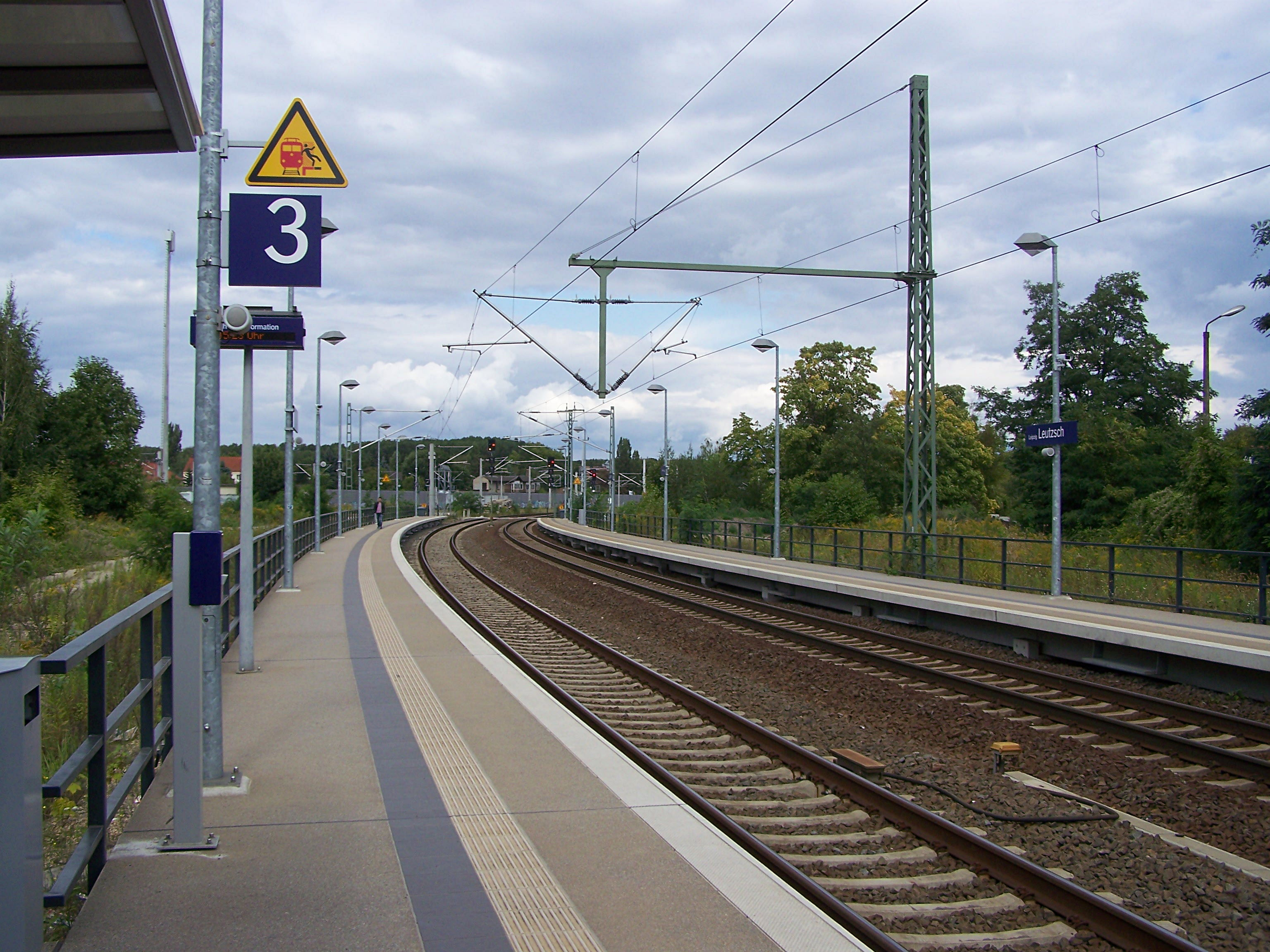 S-Bahnhof Leipzig Leutzsch, Bahnstrecke Leipzig–Probstzella, Blick nach Norden